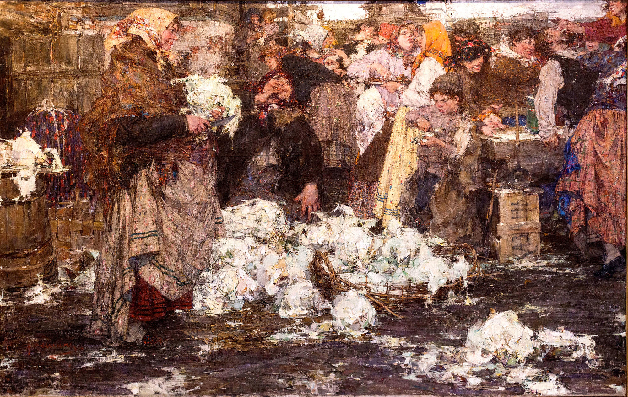 "Капустница" - выпускная работа Н.И. Фешина